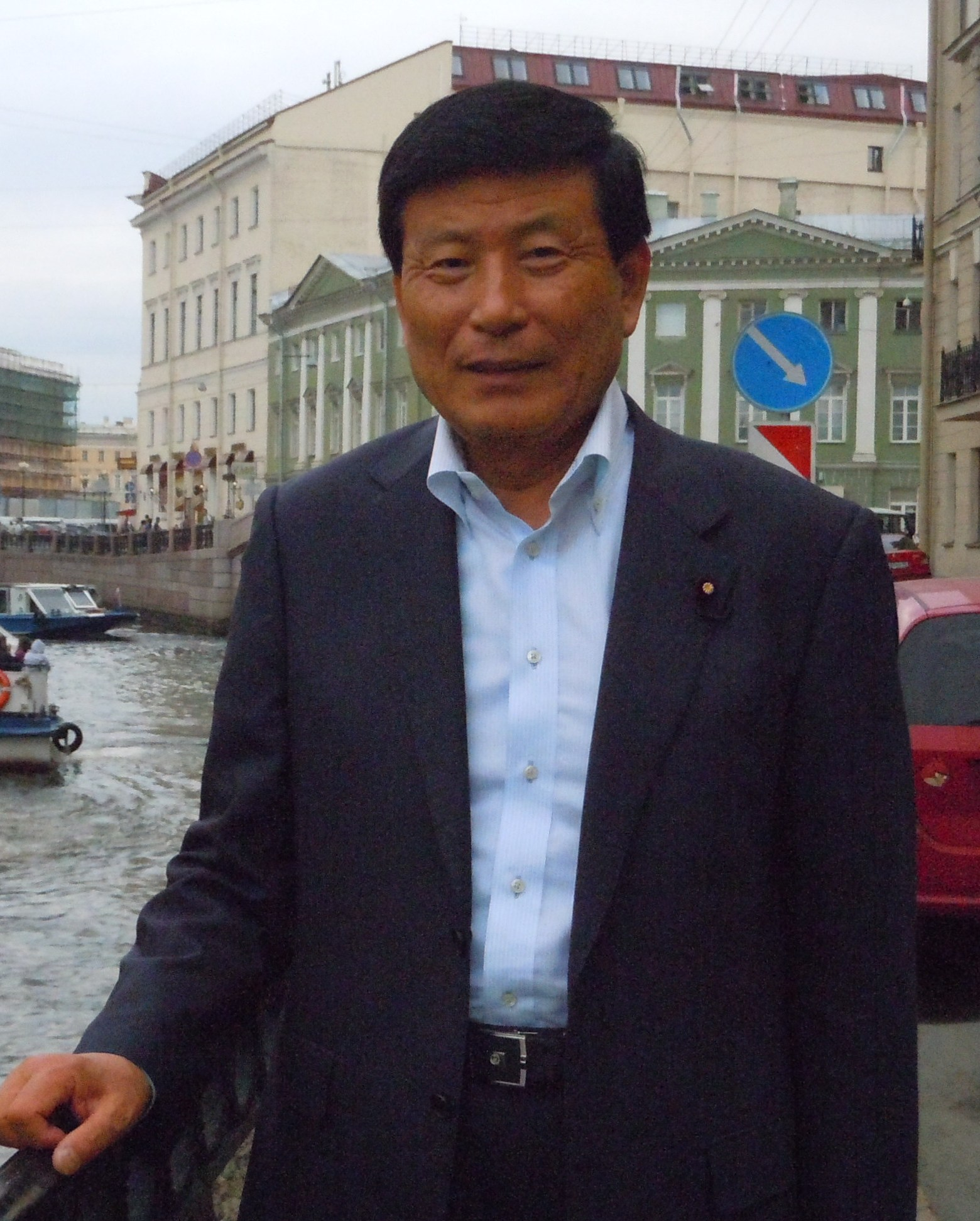 ロシアにて 2012年 APEC情報通信大臣会合出席時